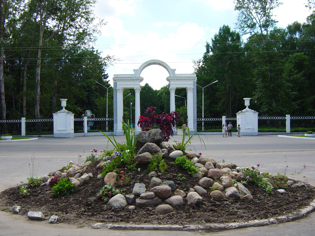 Парк Мира в городе Коломна. Вход с Каштановой аллеи.